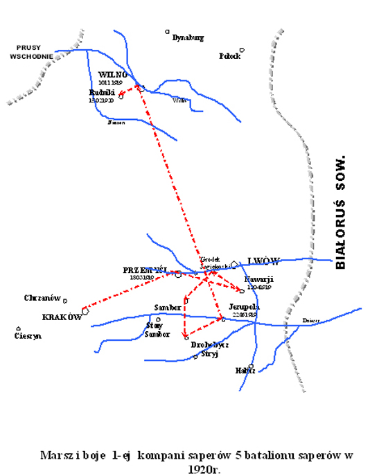 Boje i marsze 1 ksap z 5 Pułku Saperów w 1920r.